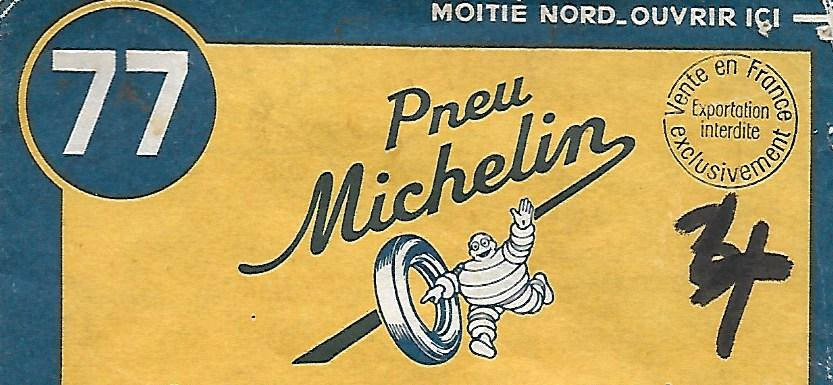 Mention sur Carte michelin 77 de 1950